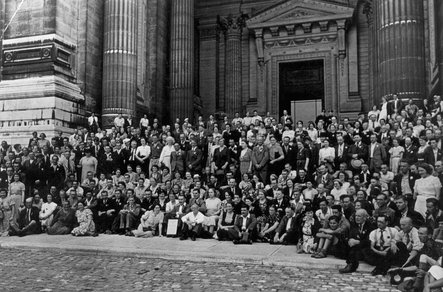 Komuna foto de la partoprenantoj de SAT-kongreso en Bruselo, 1938.